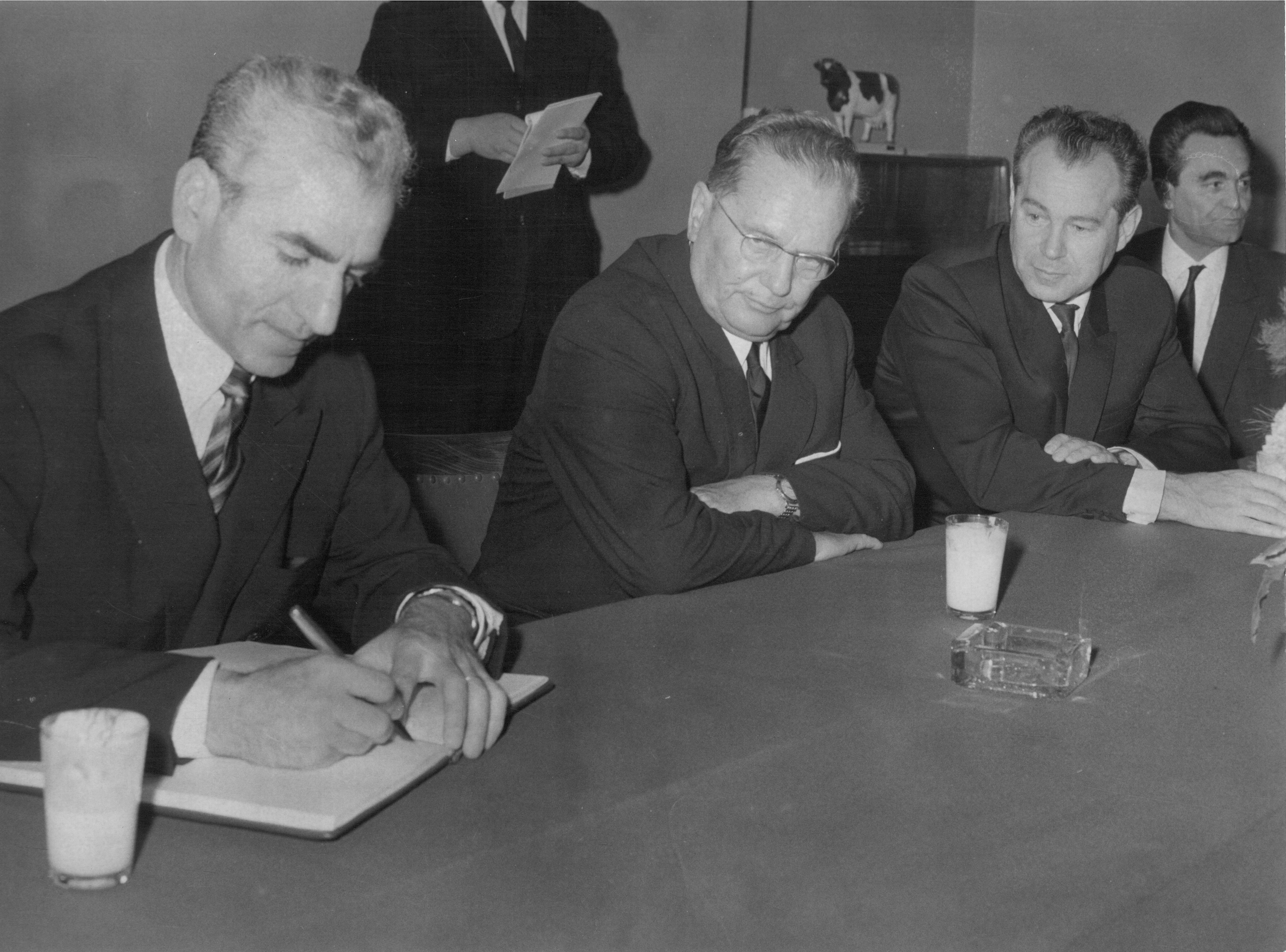 Mohamed Reza Pahlavi, poslednji iranski šah, u Beogradu, juni 1973.foto: Stevan Kragujević (po odobrenju kćerke Tanje Kragujević).